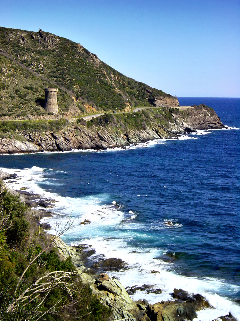 Cagnano (Corse) - La tour de L'Osso, du XVIe siècle, MH